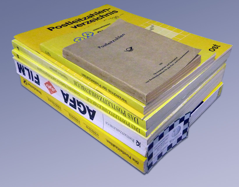 deutsche Postleitzahlenbücher von 1963 bis 2005